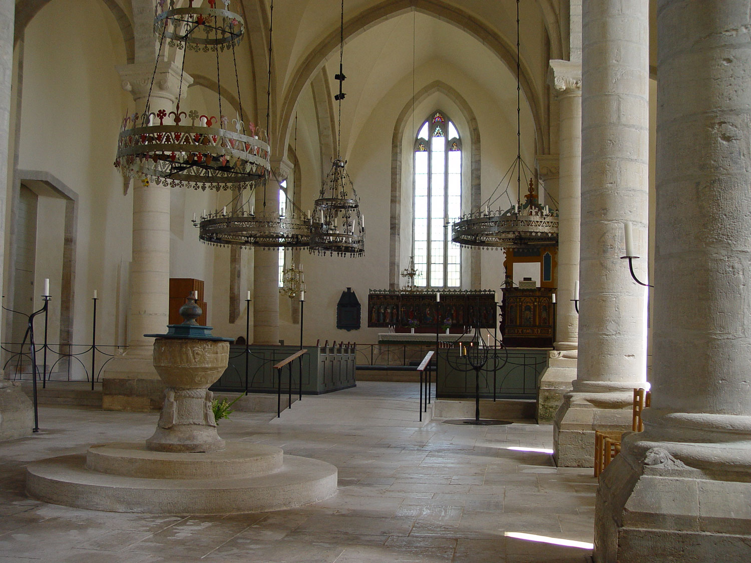 Lau kyrka auf Gotland. Dreischiffige Halle mit Kreuzgewölbe auf 6 Pfeilern